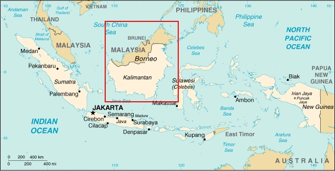 Kaart van Indonesië van CIA World Factbook, verkleind en eiland Borneo met een rode rechthoek aangegeven